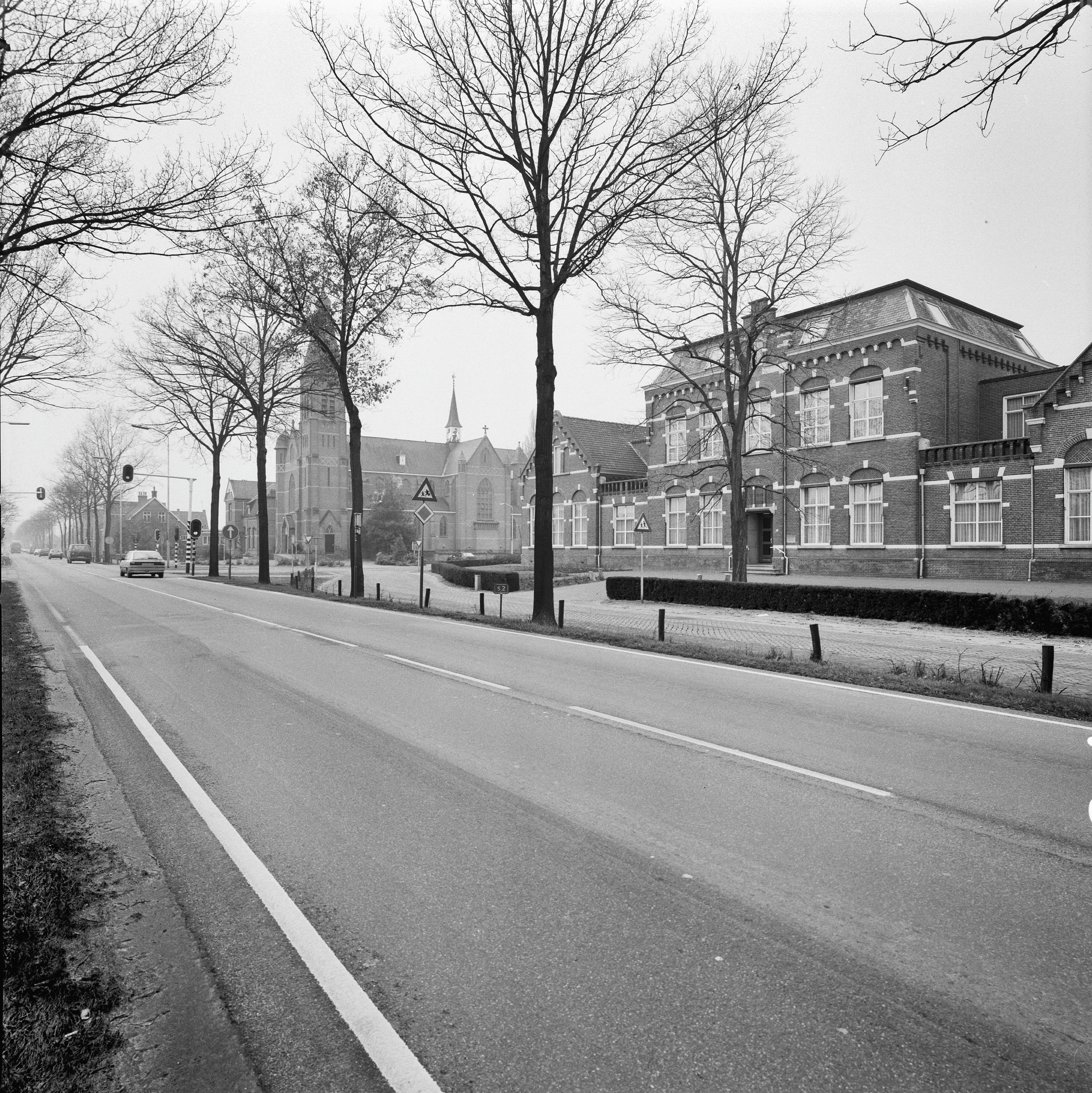 Exterieur OVERZICHT